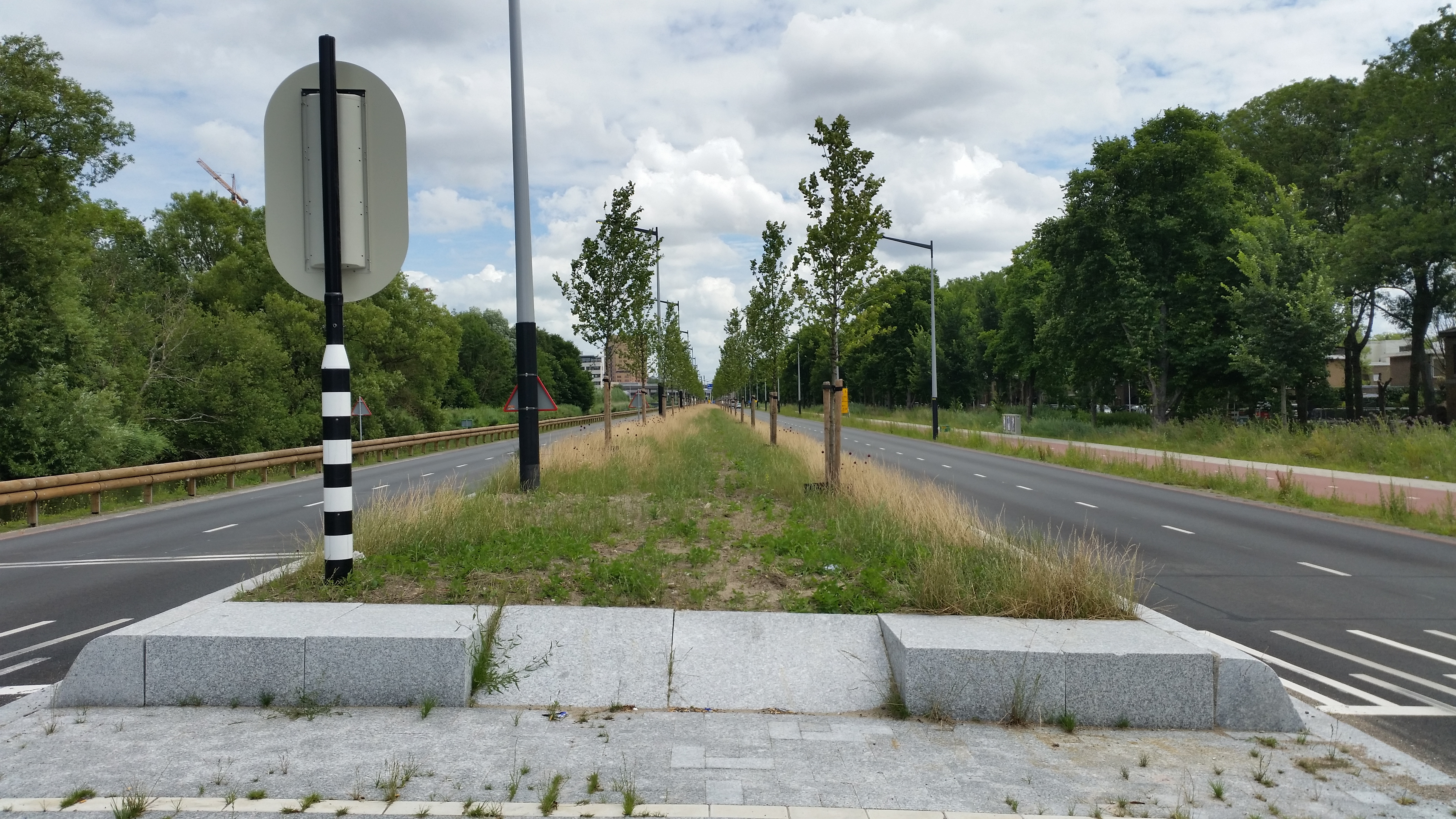 Kruising Haarlemmerweg en Burgemeester Eliasstraat na de herinrichting van de eerste (juli 2020)